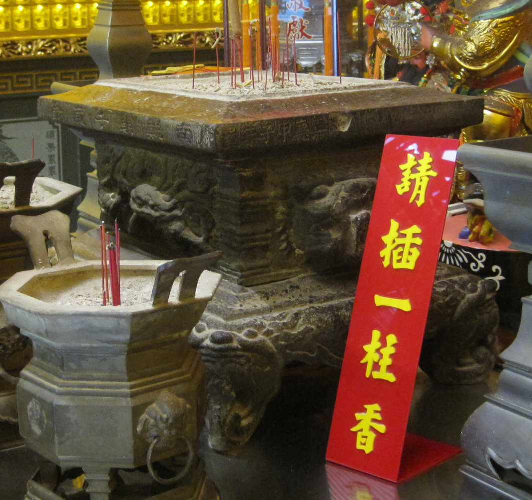 下大道良皇宮古香爐